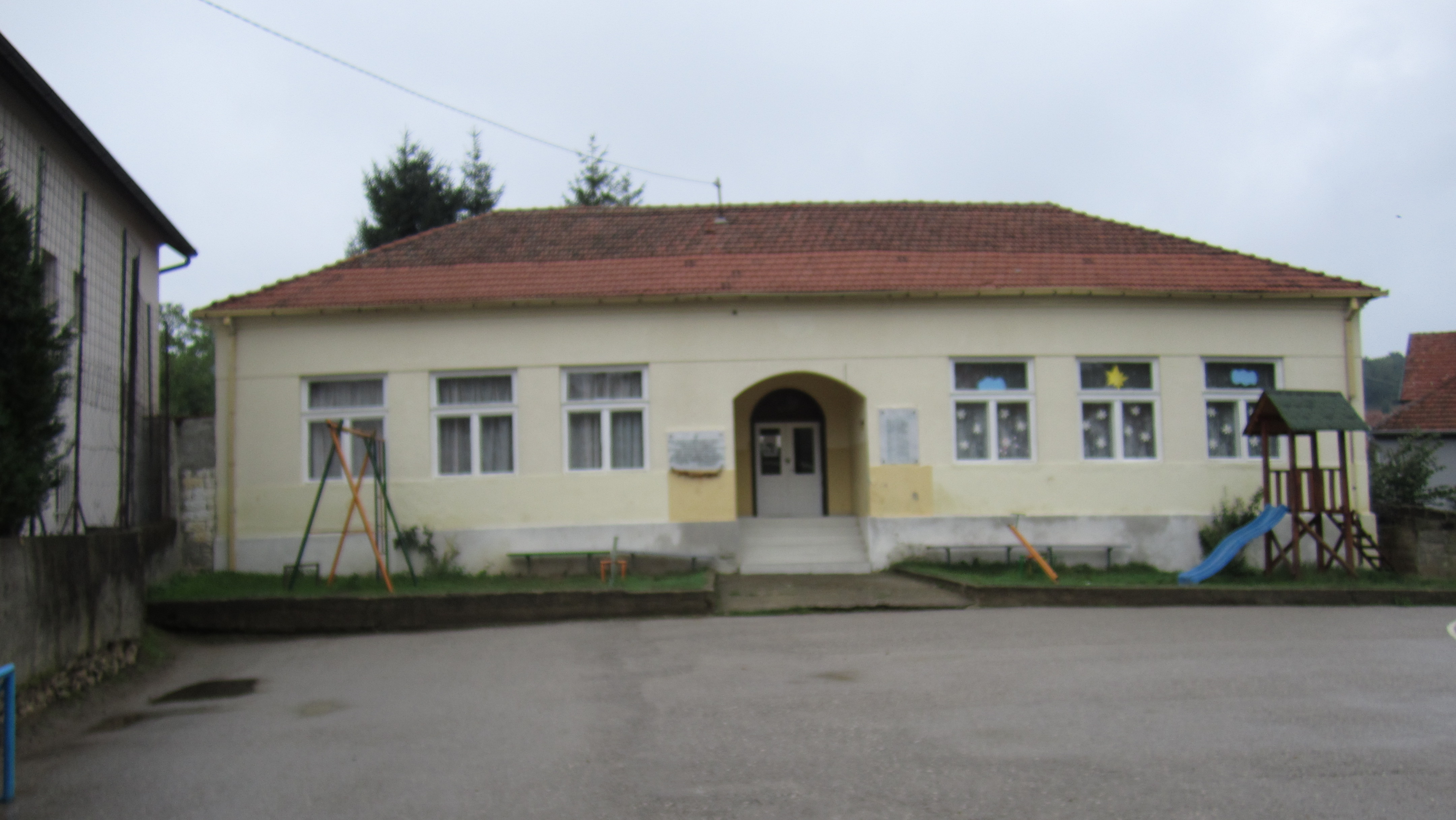 Srpski (latinica): Tulovo, Leskovac